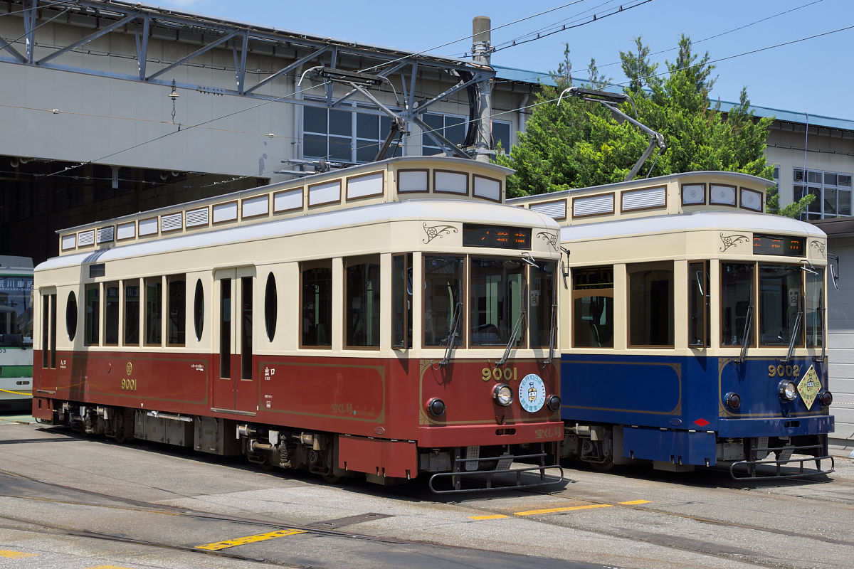 都電9000形、9001と9002。荒川電車営業所で撮影。